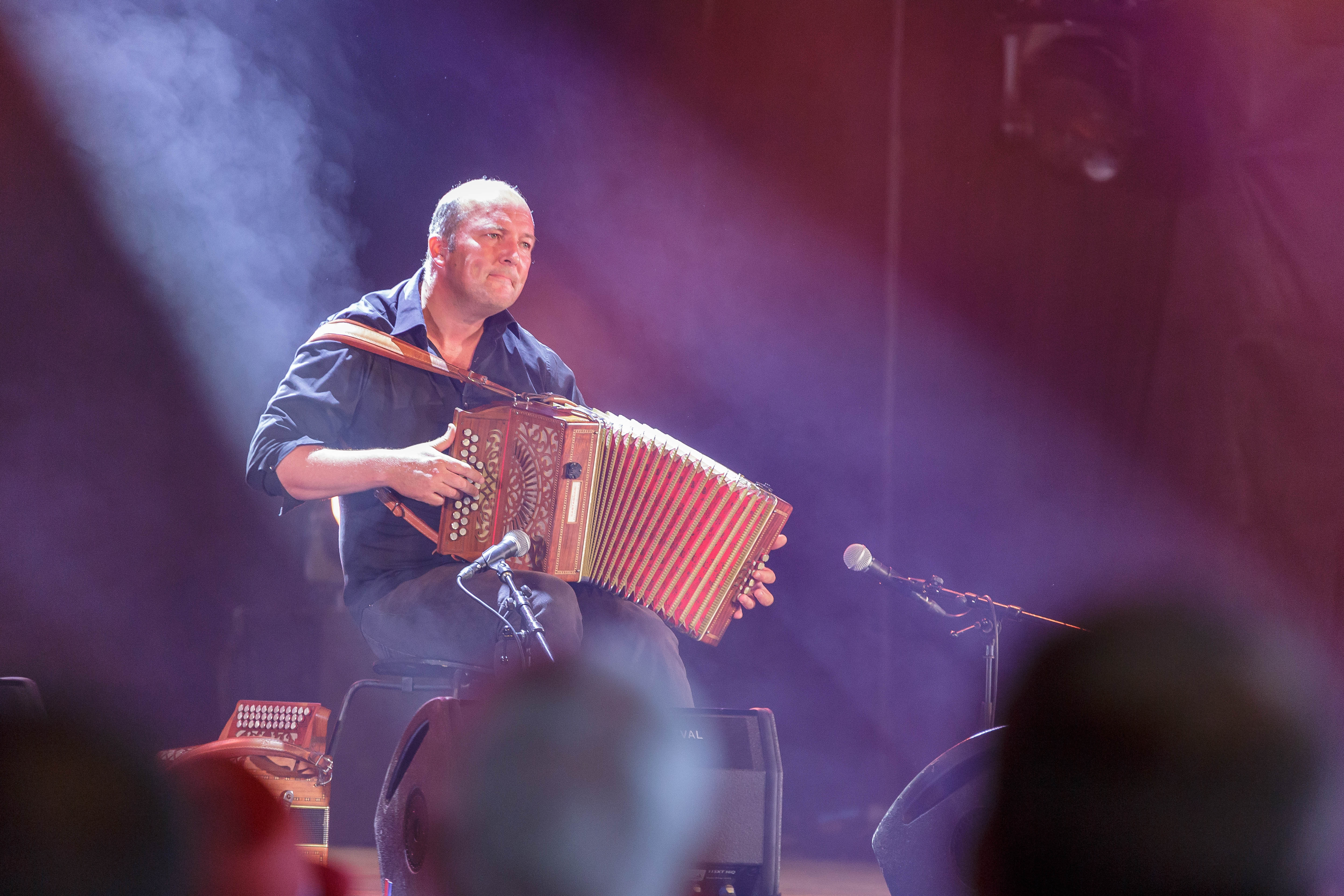 Paléo Festival Nyon, édition 2016, 19-24 juillet 2016. Jeudi 21: Les Frères Guichen (folk breton, France)